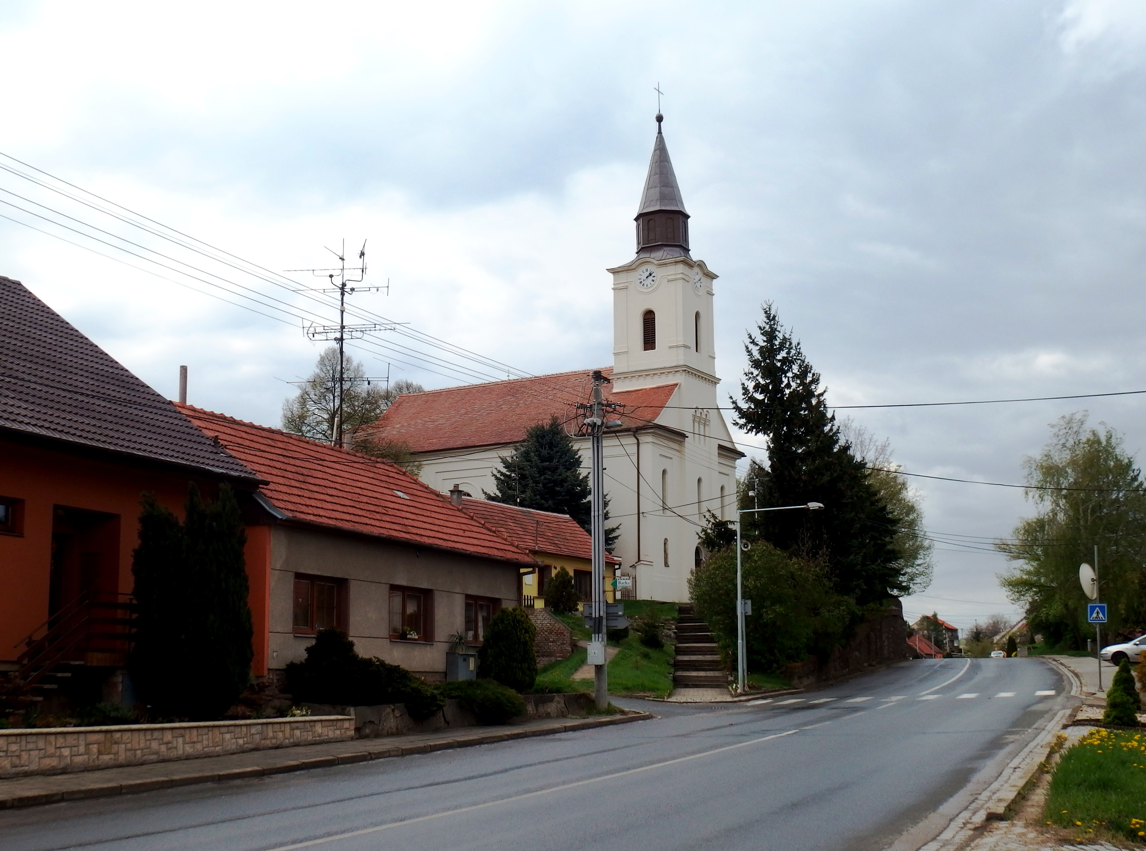 Kostel svatého Bartoloměje, st. 209, pp. 1448/1, Krumvíř.